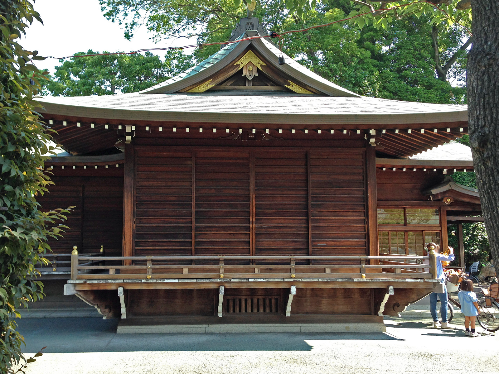 六郷神社 神楽殿